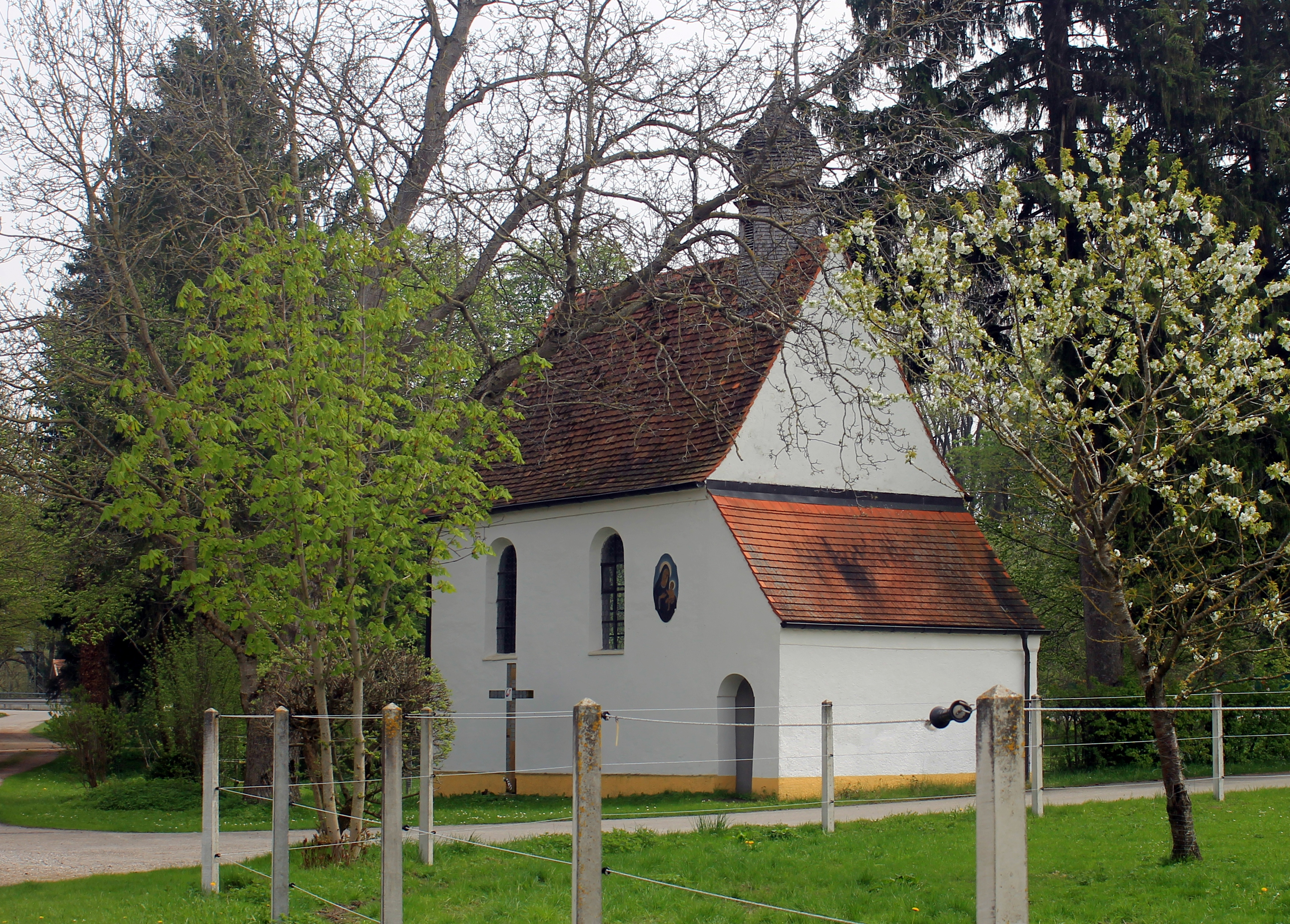 Kapelle Petrus und Paulus bei Zollhaus / Türkheim